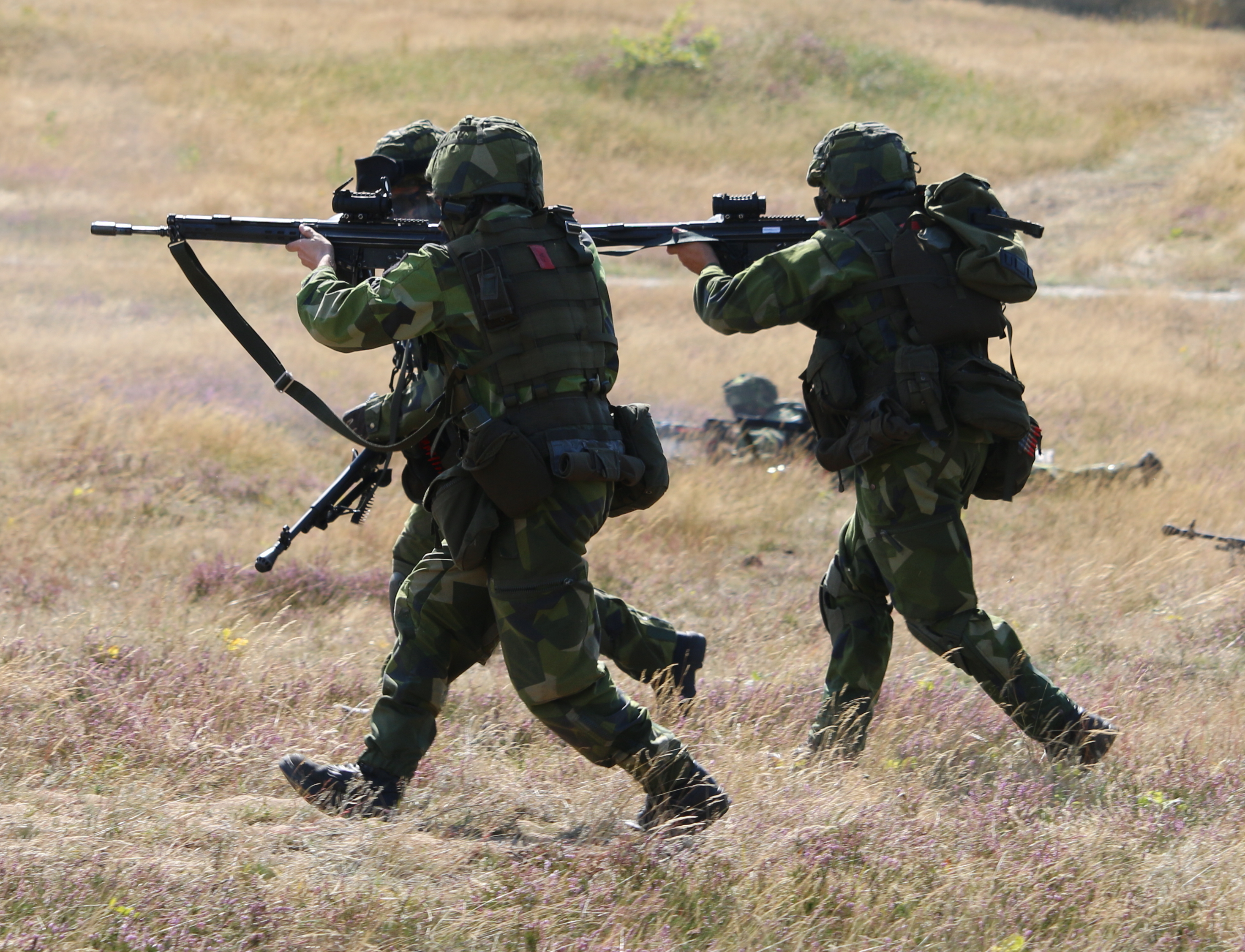 Skyttesoldater från Hemvärnet Revinge 2015